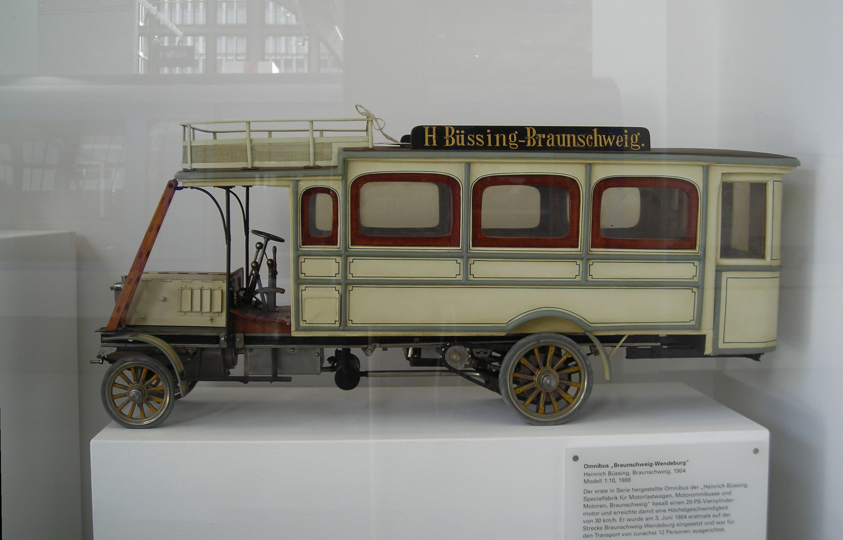 Omnibus für die Strecke Braunschweig — Wendeburg retour (erstmalige Bedienung am 3. Juni 1904), Modell im Maßstab 1:10 Dies war der erste Omnibus der "Specialfabrik für Motorlastwagen, Motoromnibusse und Motoren", Braunschweig (Heinrich Büssing), 12 Fahrgäste, 20 PS Vierzylindermotor Exponat im Deutschen Museum Verkehrszentrum München, Inv.-Nr. 1992-884?